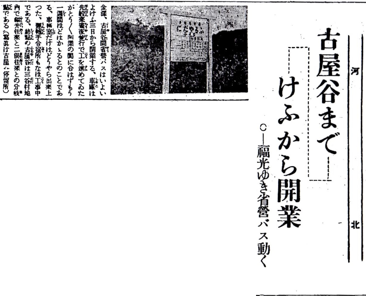 金福線金沢駅 - 古屋谷駅間開通に際する新聞